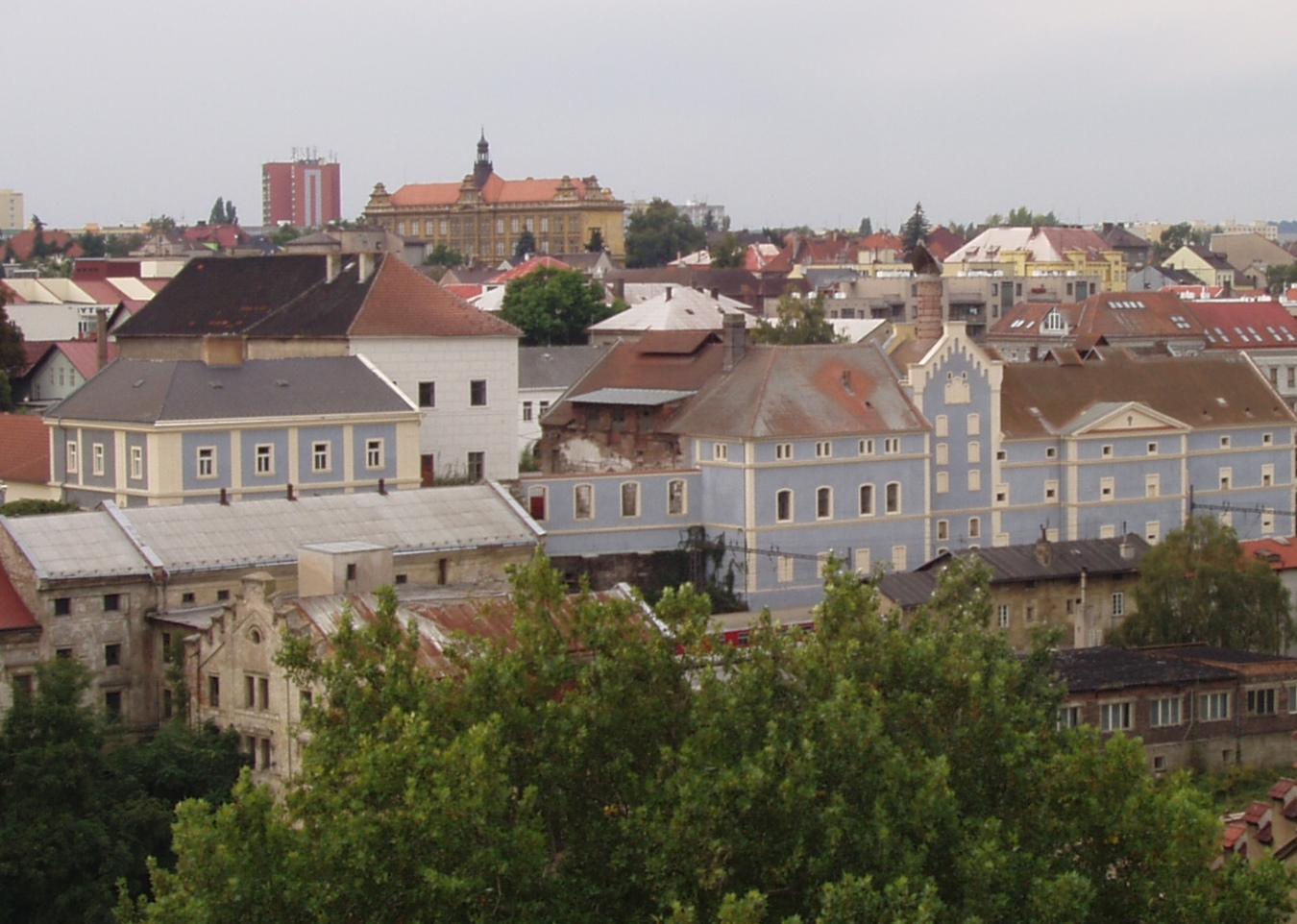 Zámek Kolín, Kolín 545